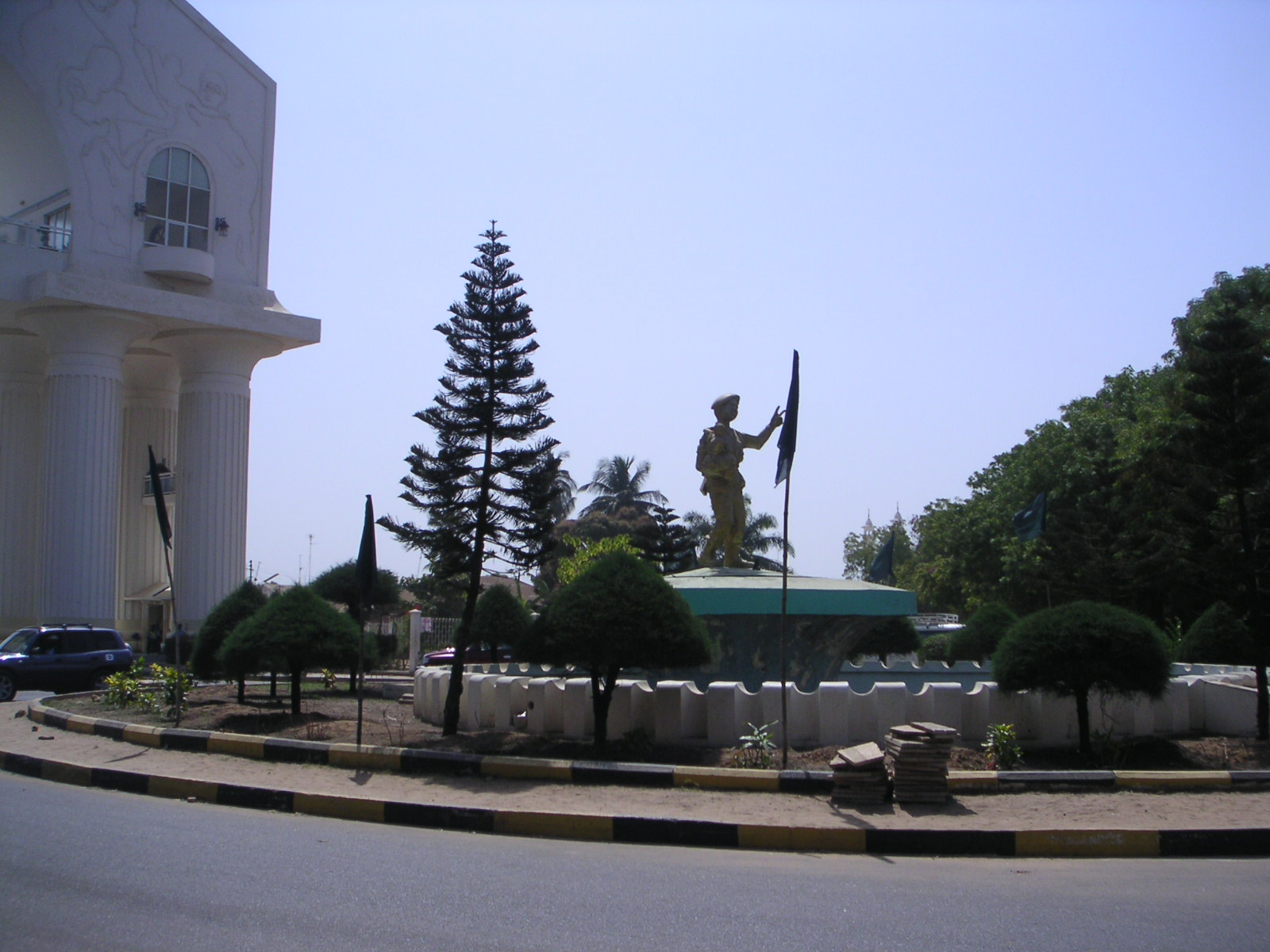 July 22 memorial, Banjul, Gambia. Photo: Soman